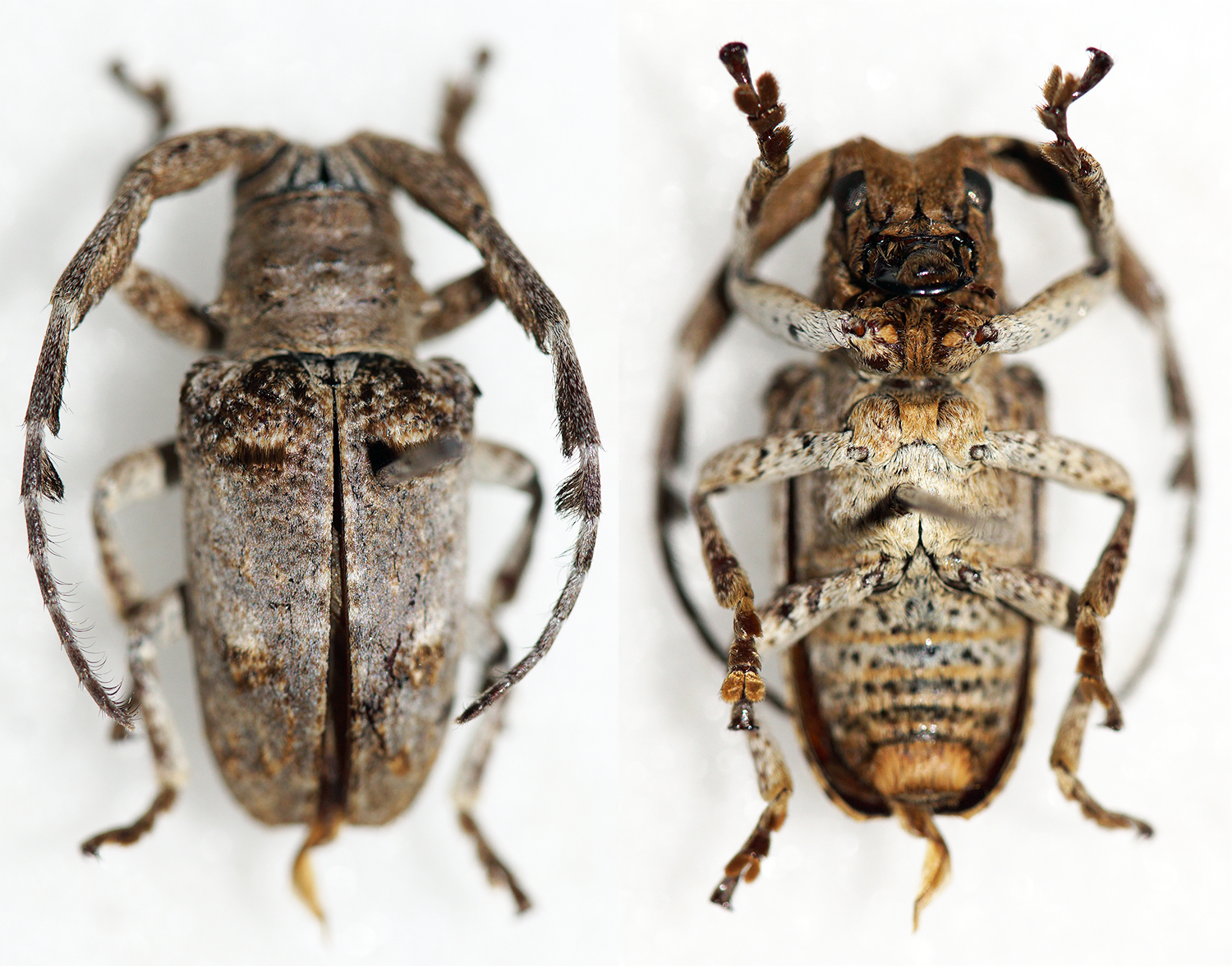 Audinet-Serville,1835 Sex: ? Data: 16-05-11 - Lliuli - Mbinga District - Ruvuma Region - Tanzania Size: 12.5mm